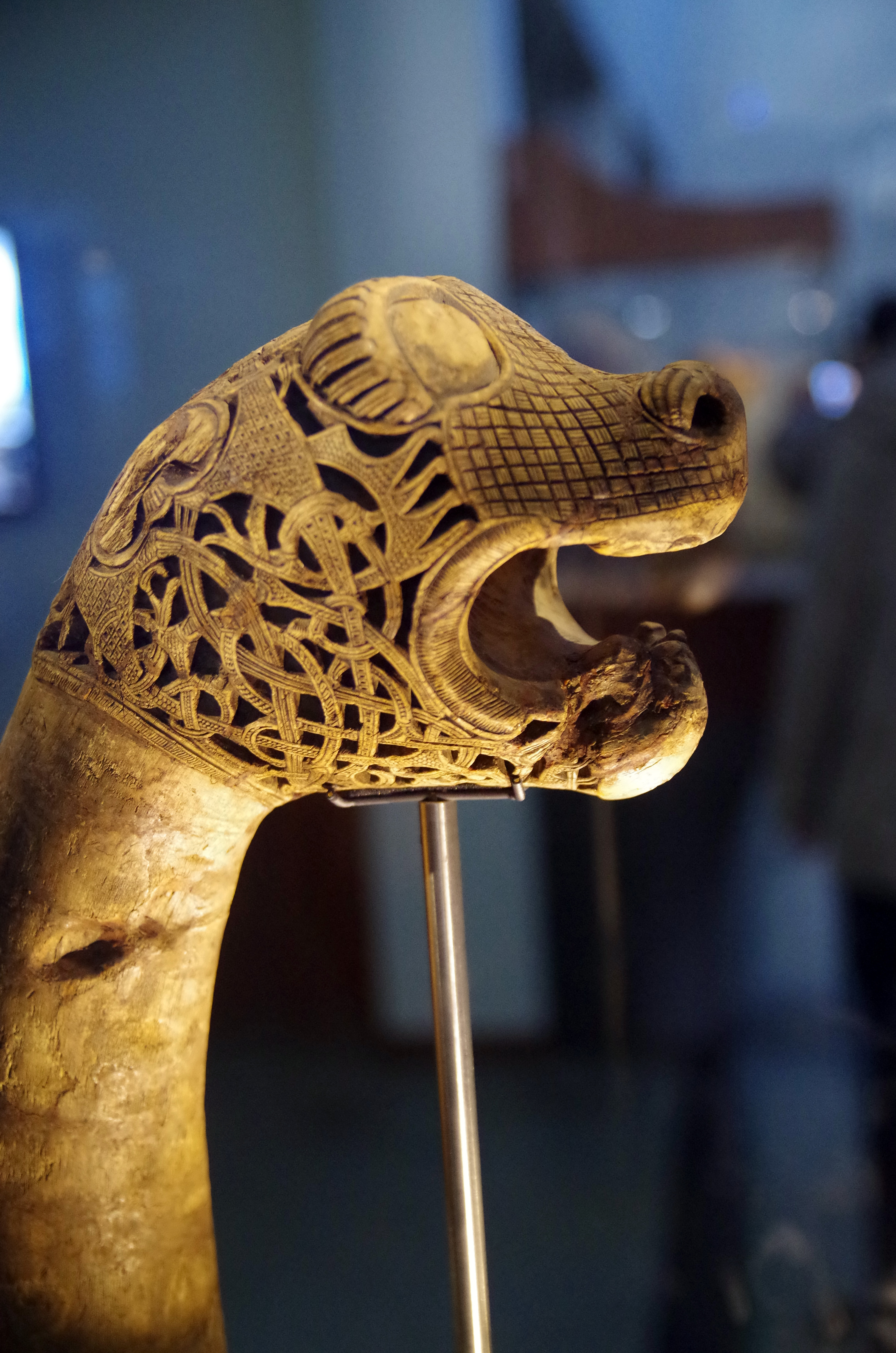 Wikingerschiffsmuseum Oslo Grabbeigaben